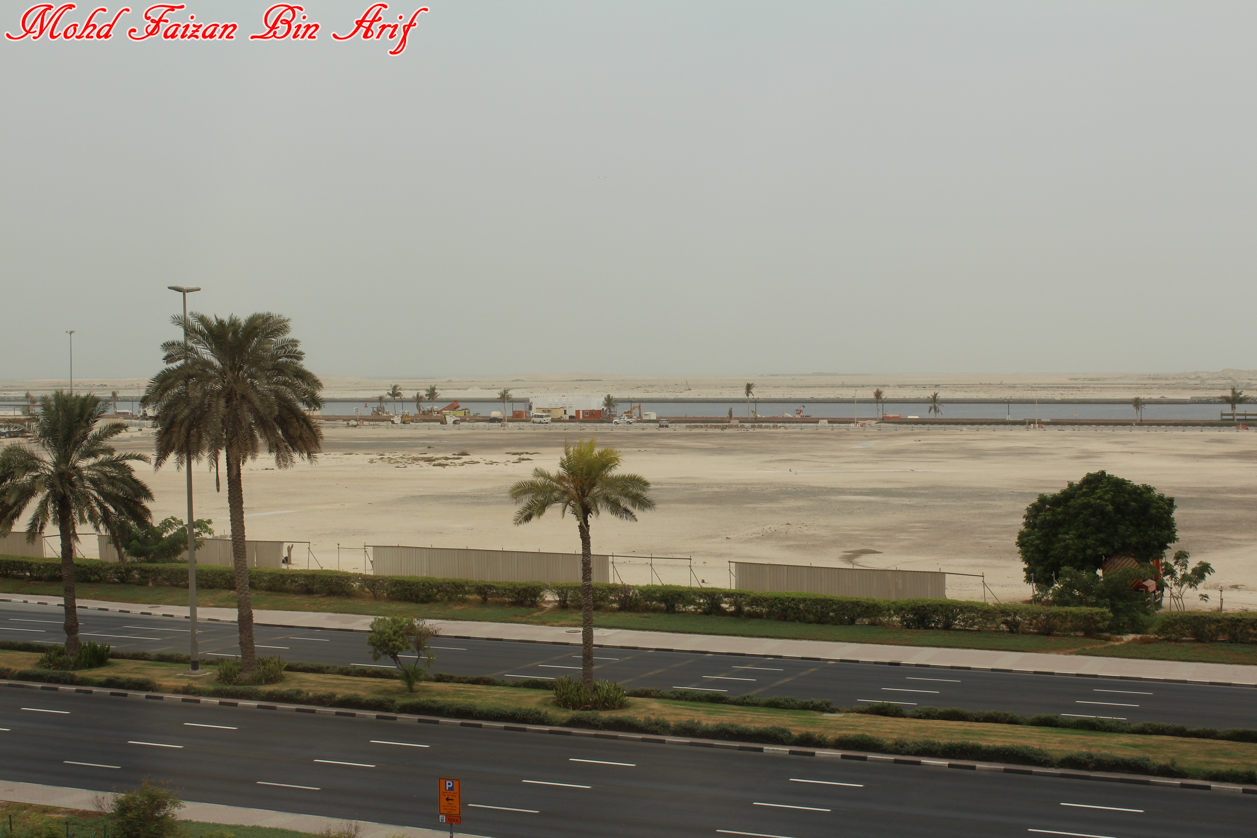 Al Baraha - Dubai - United Arab Emirates